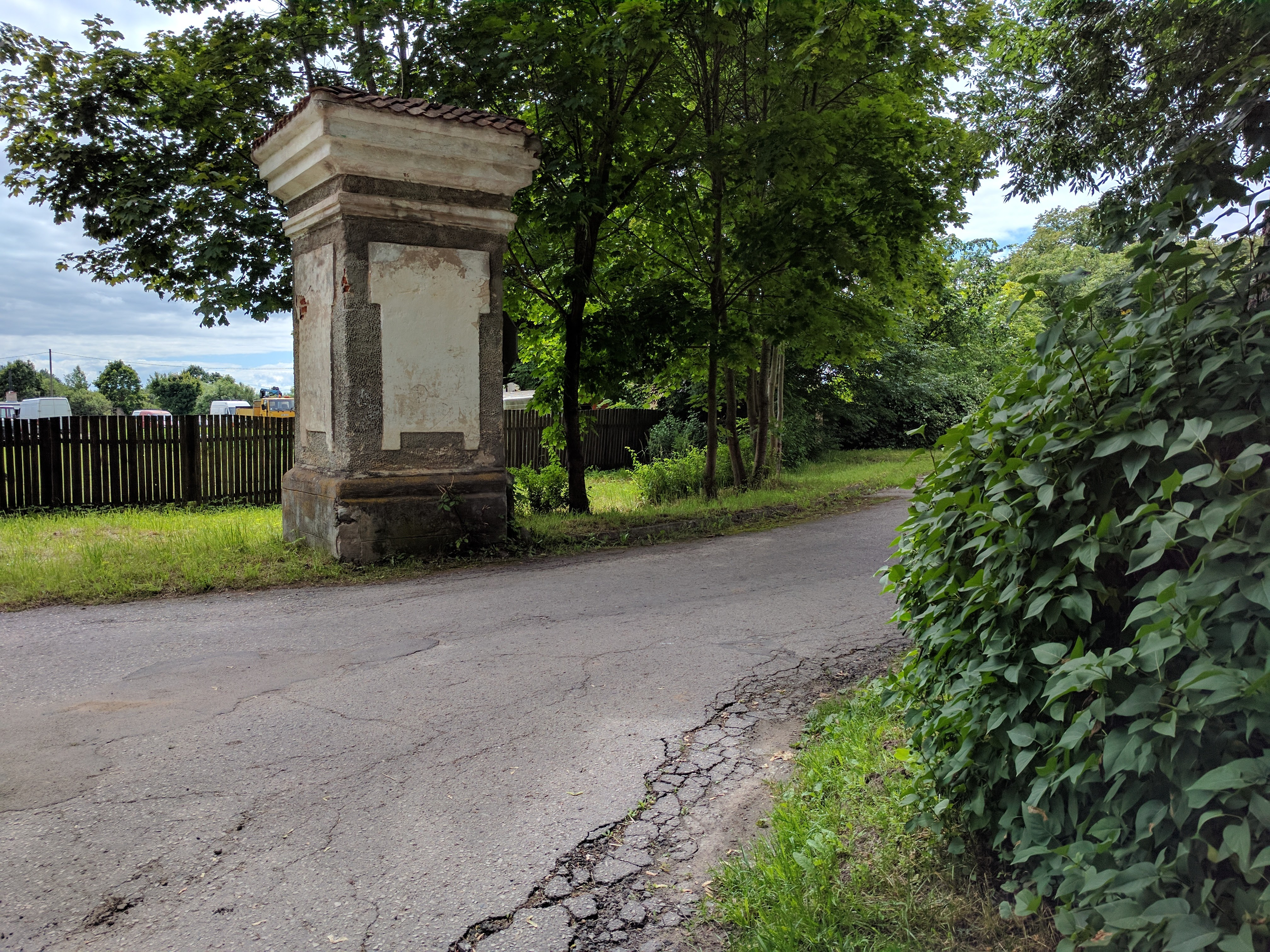 Pozostałość po bramie wjazdowej do folwarku w Radopole